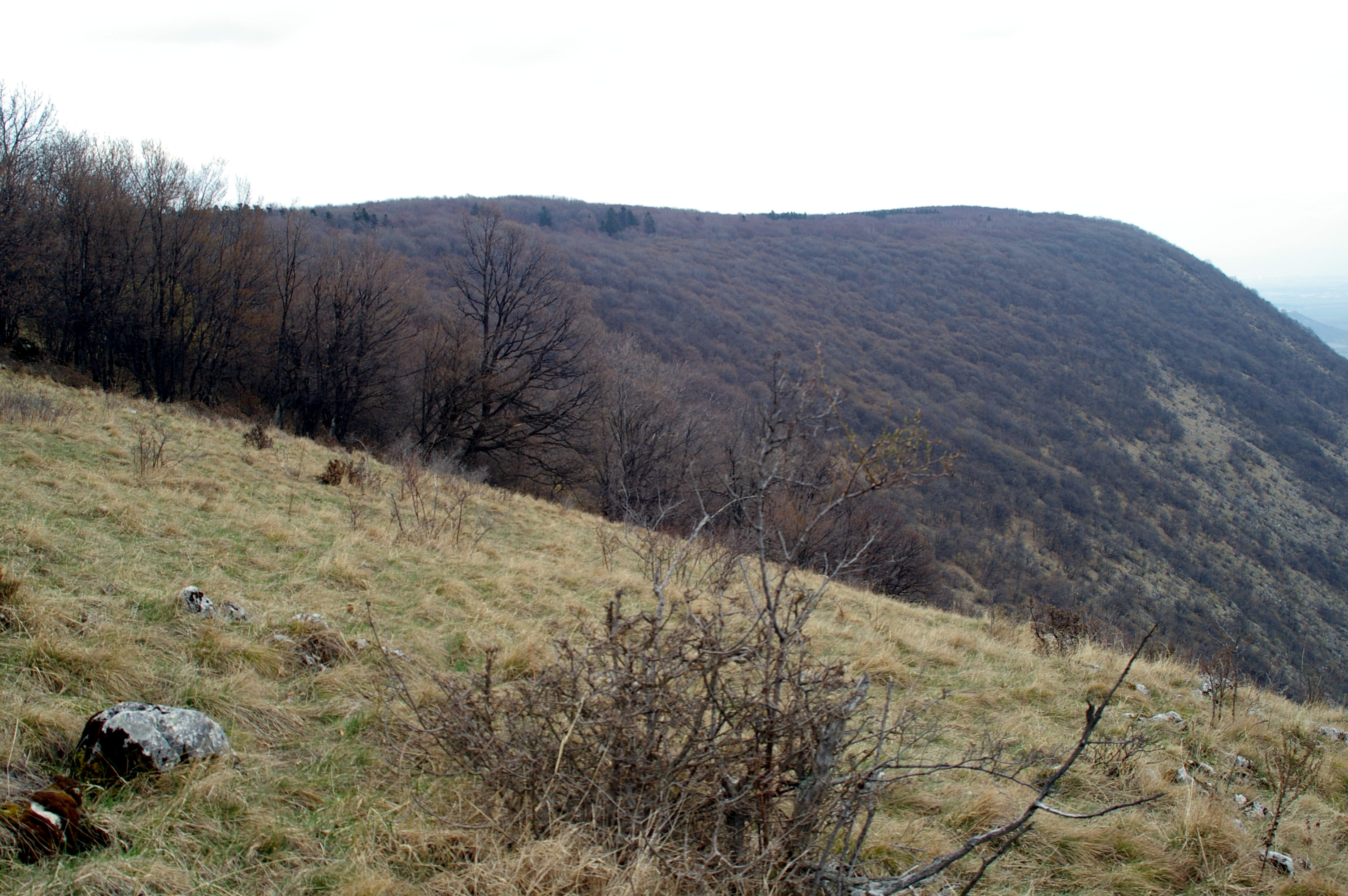 Planina Horní vrch